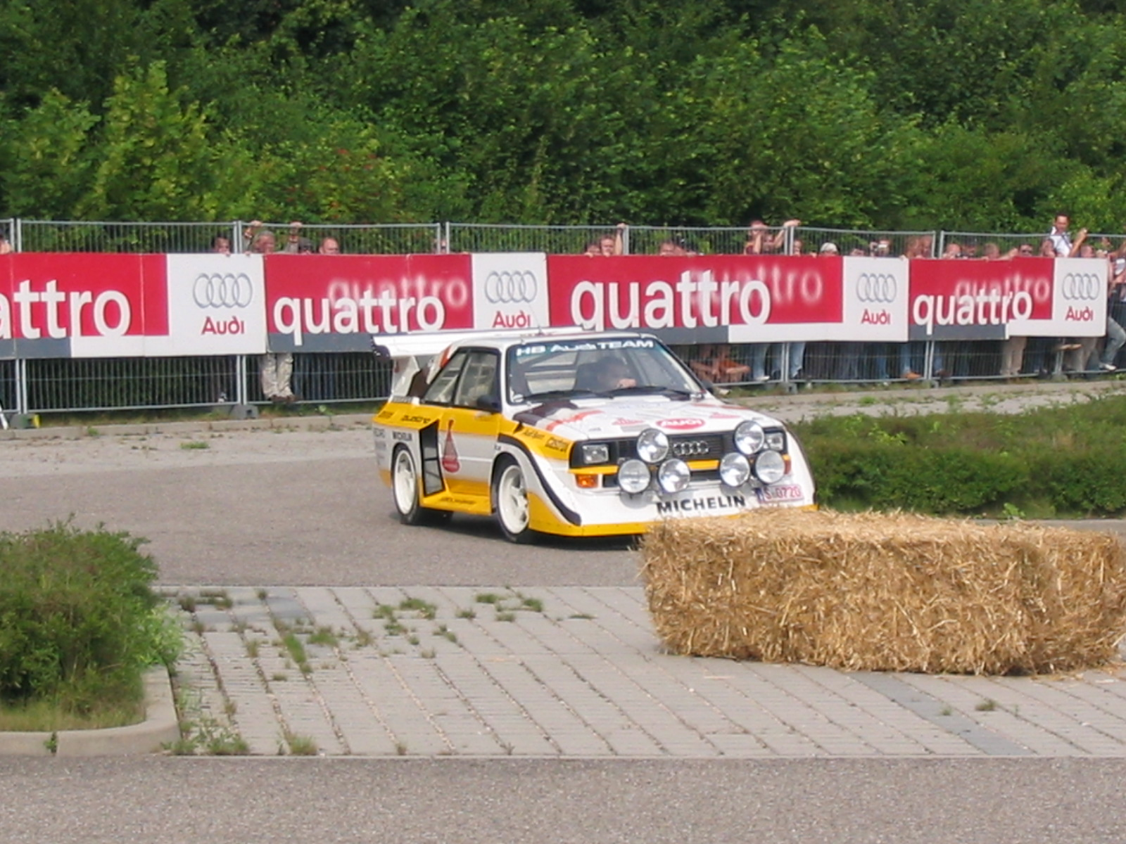 Audi Sport quattro E2 im August 2005 in Ingolstadt. Am Steuer sitzt Stig Blomqvist.